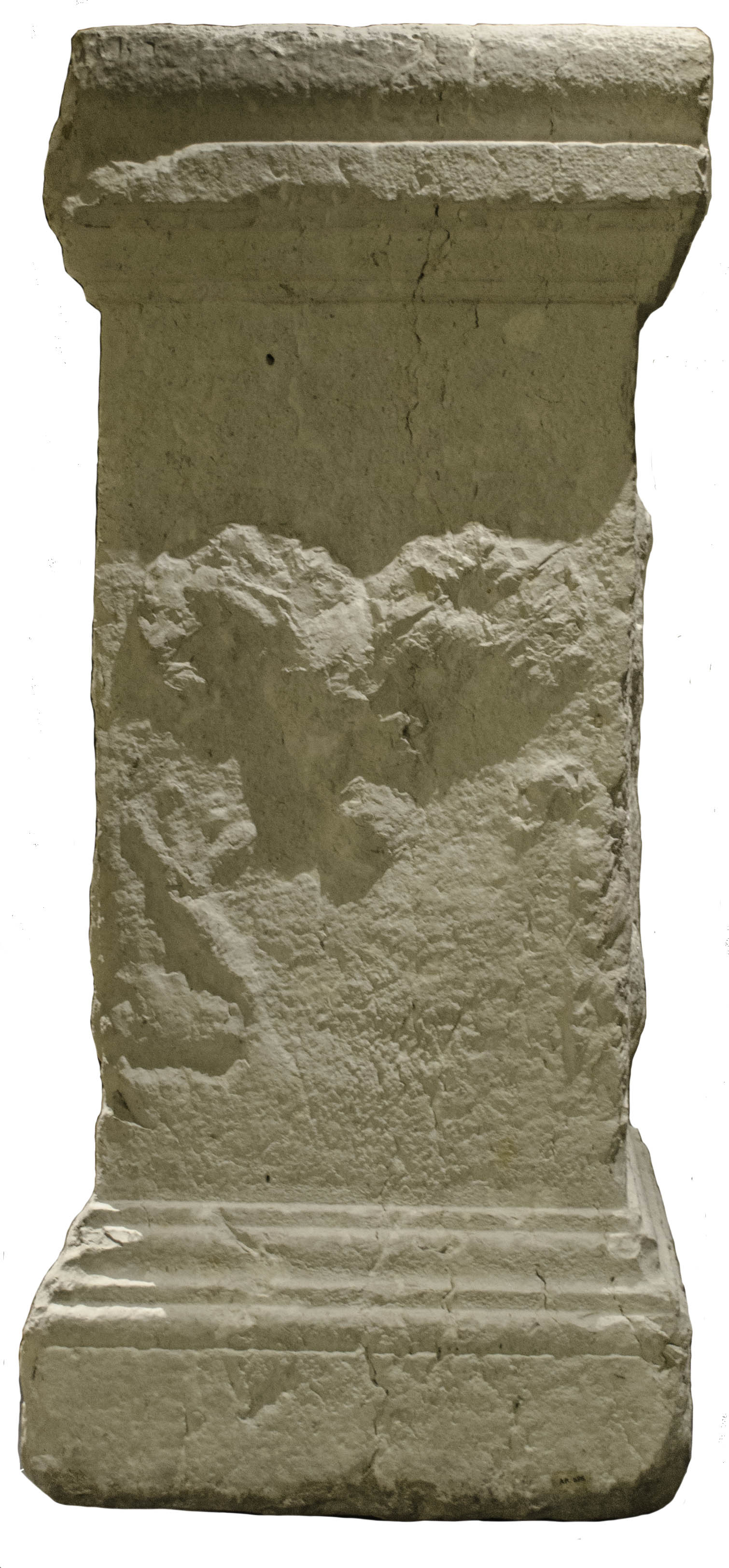 Autel taurobolique des dendrophores, CIL XII, 1744, face latérale droite : tête de bélier. Musée des beaux-arts et d’archéologie de Valence (Drôme)